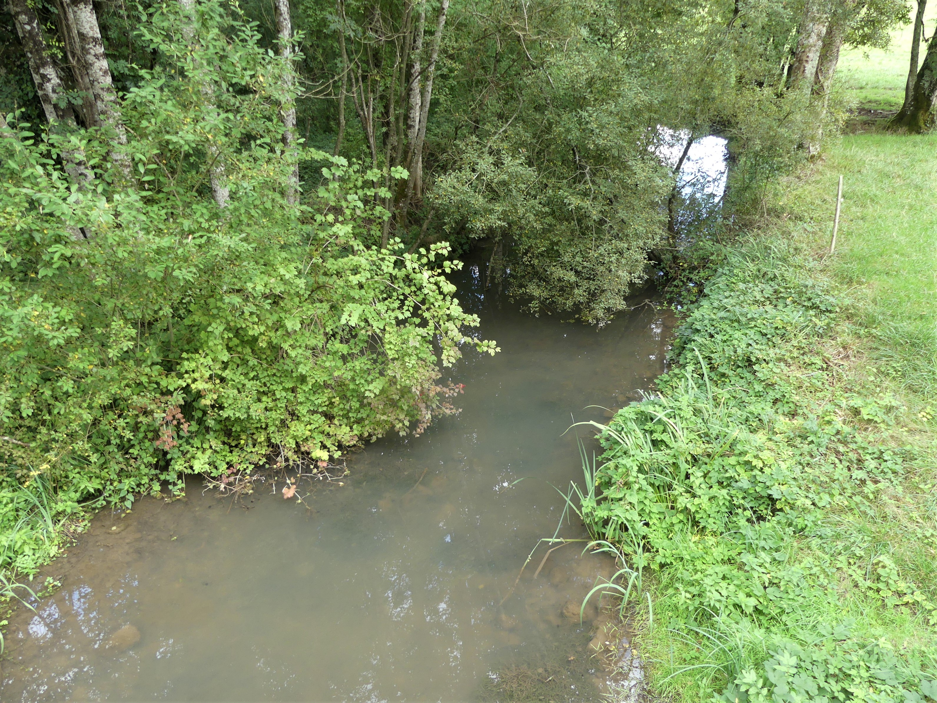 La Nizonne au pont de la route départementale 99, en limite de la commune déléguée des Graulges (à gauche, commune nouvelle de Mareuil en Périgord) et de Sainte-Croix-de-Mareuil (à droite), Dordogne, France. Vue prise en direction de l'amont.